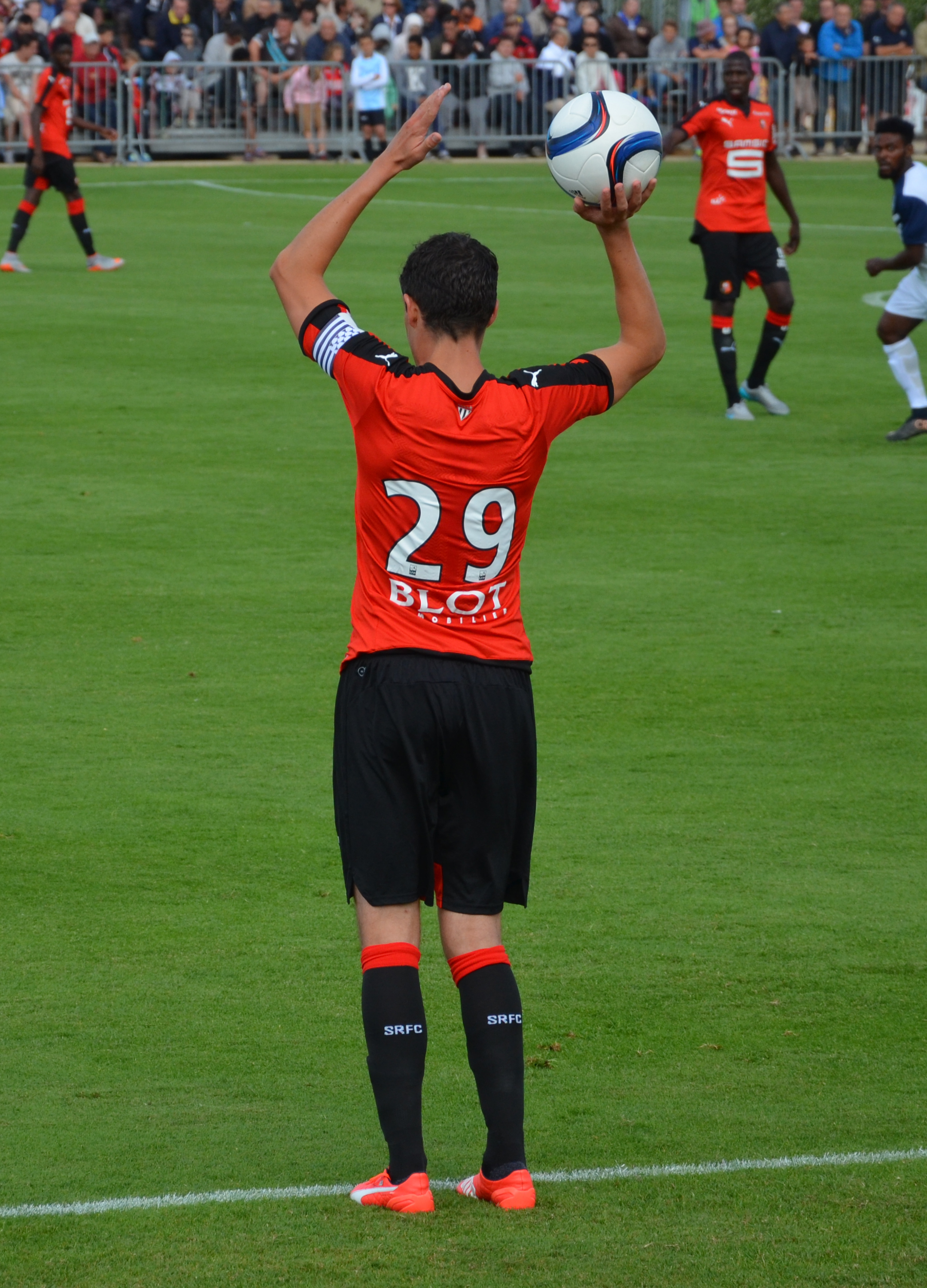 Photographie prise lors du match opposant le Stade rennais au Havre AC en amical au stade Paul-Audrin de Dinard le 8 juillet 2015. Ici, Romain Danzé.